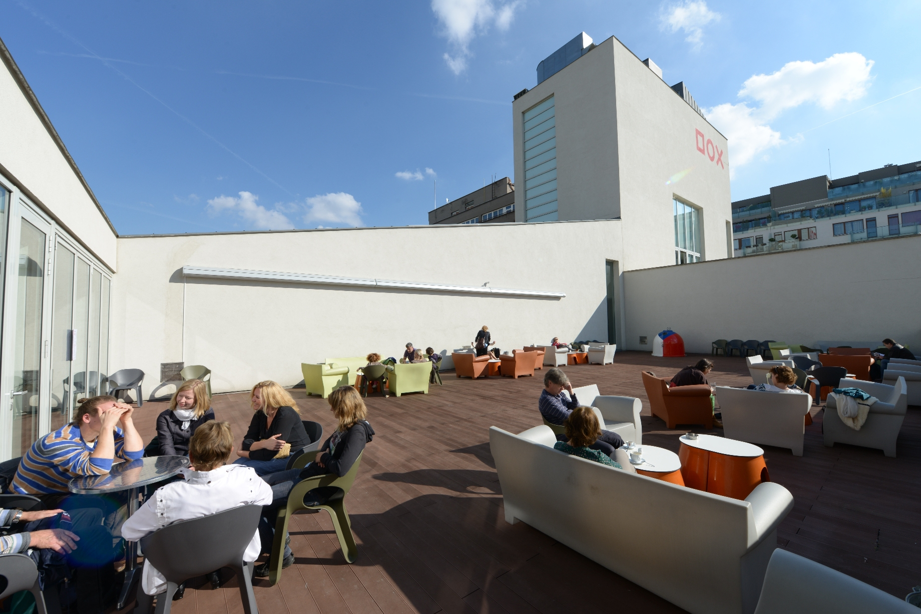 terasa